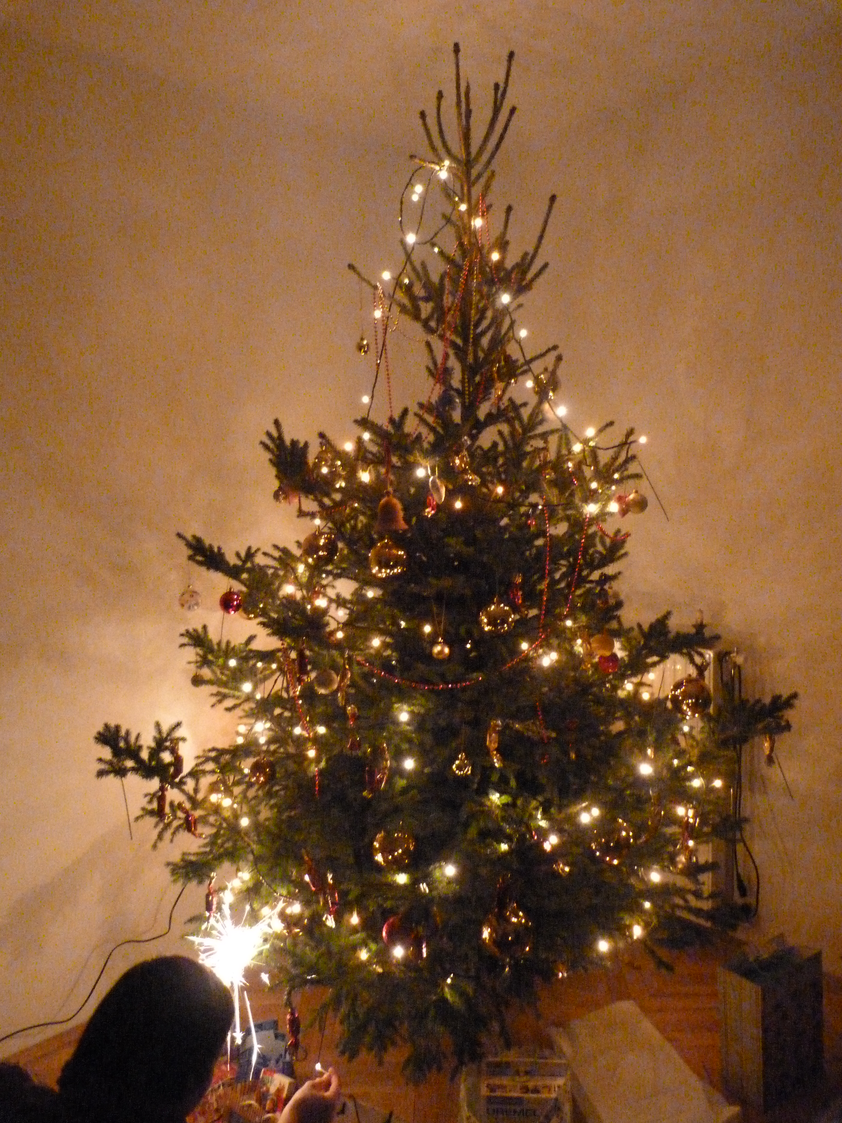 Live on the 24th of December, 2012. Budapest, Buda. Home of a family living in the Buda part of the town. Christmas tree, cca 2,8 m long. Pine wood, decorated with glass balls, pearls, lamps, candy. The tree was bought on the Hunyadi tér local market, Terézváros. The offer price was 6000 Ft, it was bought for 5500 Ft. 38 dkg candy put on the tree was bought for 800 Ft. At the local catholic church at the end of the day midnight mess was held, where cca 200 members of the Catholic Church participated. ©©Public domain, Derzsi Elekes Andor, Budapest, 2012, . You are authorised to use these photos and vids under Creative Commons – even for commercial, for profit purposes. Photos must be attributed to Derzsi Elekes Andor. All of the photos and vids in the Metapolisz DVD line are under Creative Commons and can be used even for commercial – for profit – purposes. Recommended Citation Derzsi Elekes Andor: Metapolisz DVD line